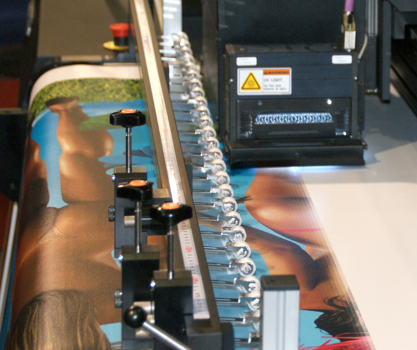 Large format inkjet printing system using a moving print head connected with an UV lamp that cures the printing image built-up line-by-line